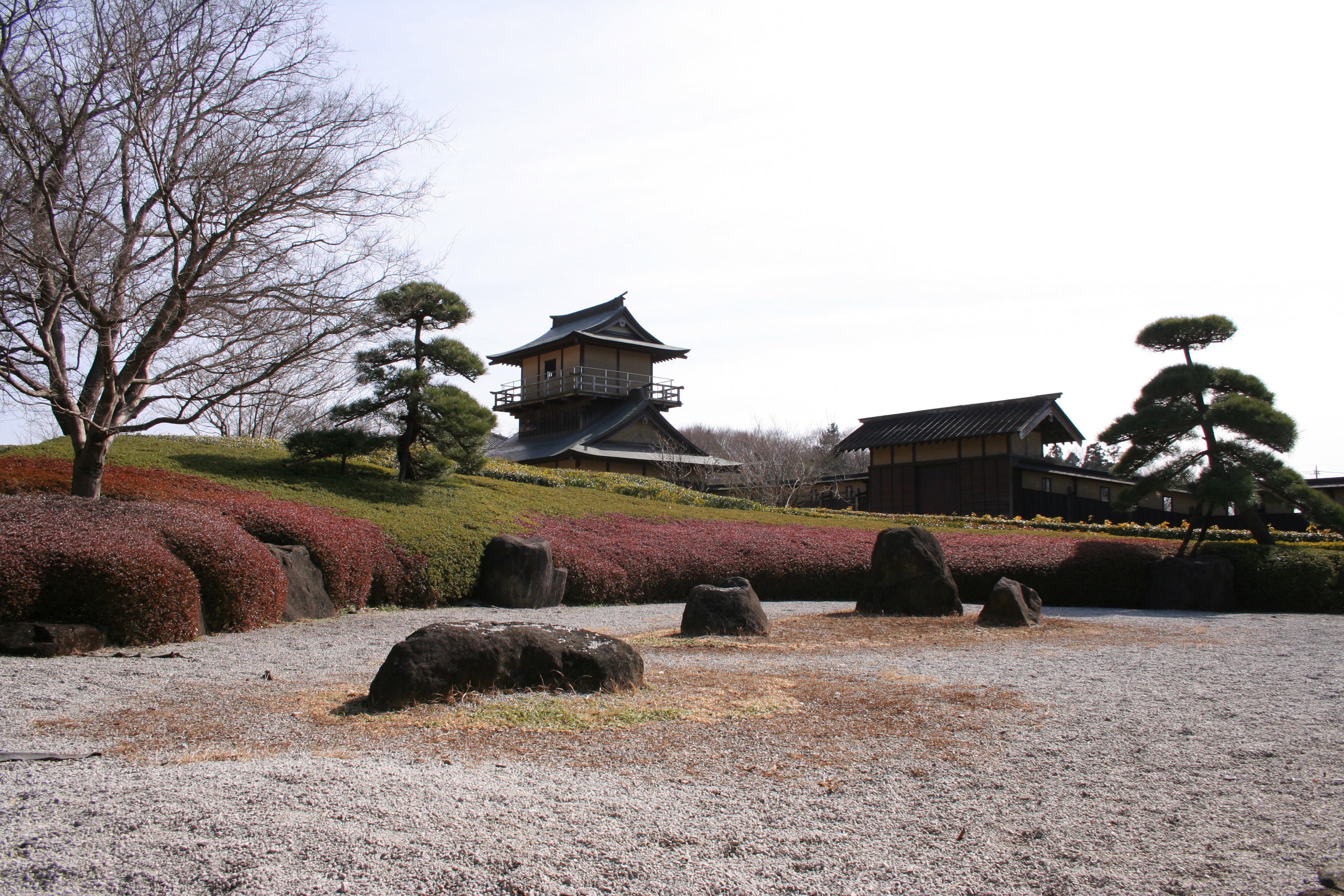 逆井城の庭園